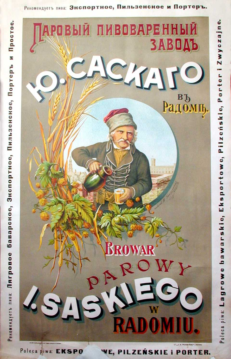 Wiek XIX przyniósł postęp technologiczny, a co za tym idzie rozwój produkcji piwa na skalę przemysłową. Przykładem może być tutaj “Browar J. Saskiego”, który z niewielkiego browaru dworskiego, przejętego w 1812 przez Józefa Saskiego, a potem kierowany przez jego potomków, przekształcił się w nowoczesną firmę, liczącą się na rynku lokalnym i nie tylko, a zarazem silnie związaną z regionem radomskim. Rozwój ten nabrał tempa w II połowie XIX w., kiedy to Browar Saskiego zdystansował swoich konkurentów na rynku radomskim. Trudno określić – ze względu na ubóstwo zachowanych materiałów- czy przedstawiony plakat reklamujący produkty Browaru był zjawiskiem wyjątkowym, jeśli chodzi o rynek piwa w Radomiu. Niewątpliwie wyróżnia się wśród nielicznych zachowanych reklam rozmachem ilustracyjnym, co może dowodzić nowoczesnego podejścia właścicieli firmy do prowadzenia interesów, a zapewne również dobrej kondycji finansowej firmy. Brak dokumentów mówiących o wielkości sprzedaży lub też produkcji browaru z lat 1907 – 1926, nie pozwala stwierdzić, jakie efekty przyniosła ta kampania reklamowa. Opis zewnętrzny: Oryginał, jęz. polski i rosyjski, papier, wymiary 510 mm x 810 m Miejsce przechowywania:Archiwum Państwowe w Radomiu, Zbiór afiszów, plakatów i druków ulotnych, sygn. 3687 Autor komentarza: Małgorzata Comber Autor fotografii: Margerita Katana